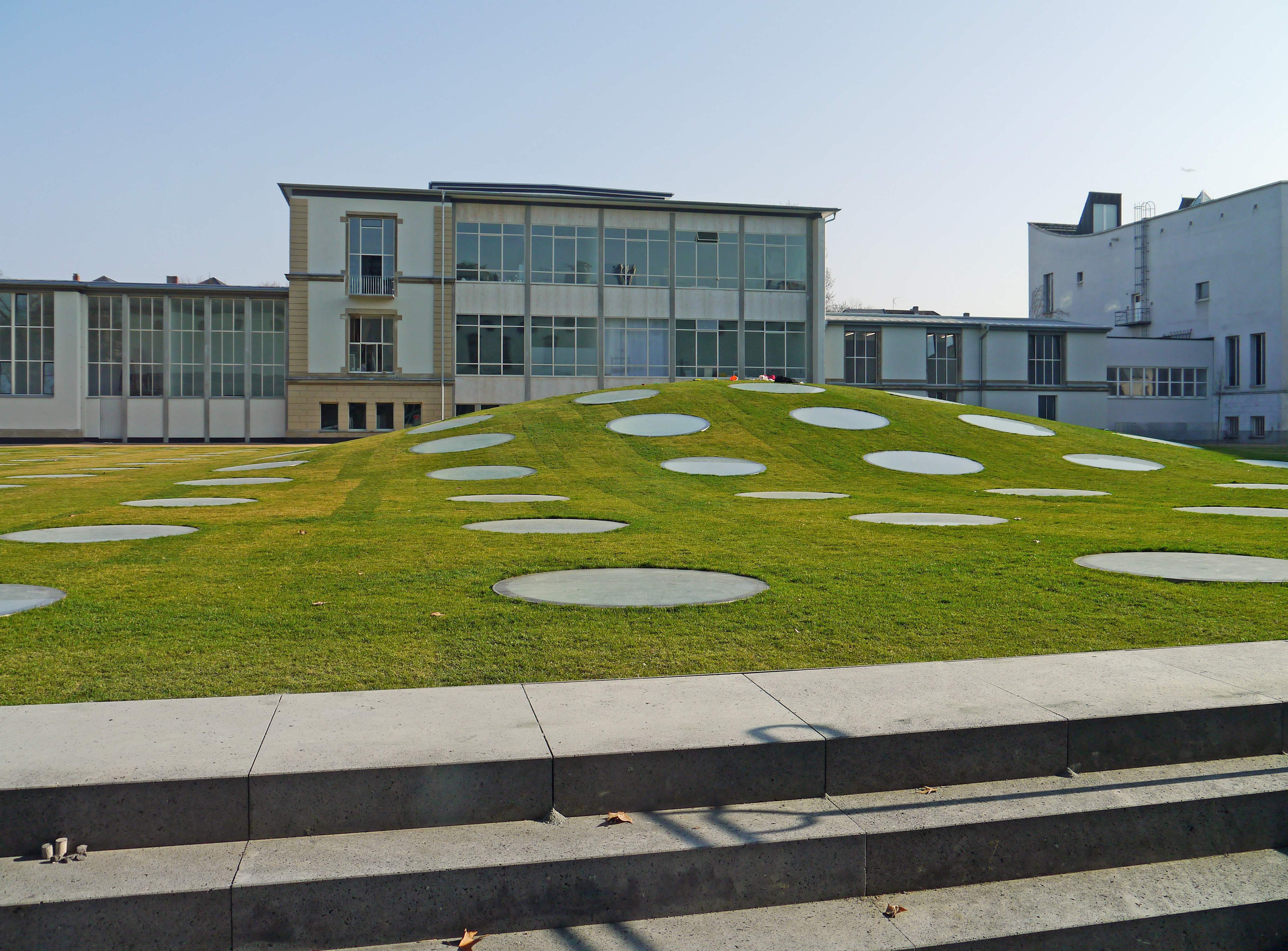 Rasendach des Staedel-Erweiterungsbaus, 2012 in Ffm.